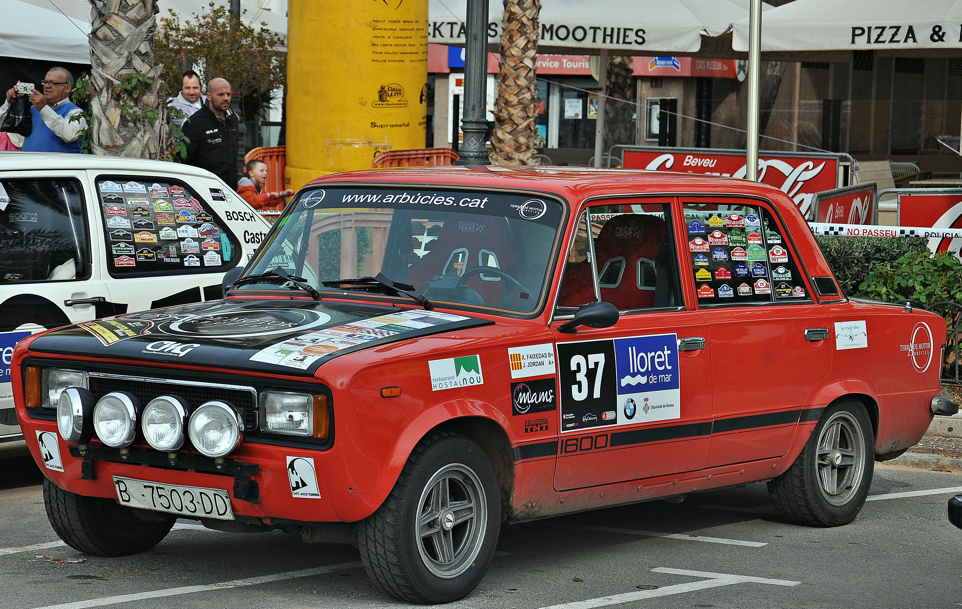 Seat 124 FL-1978